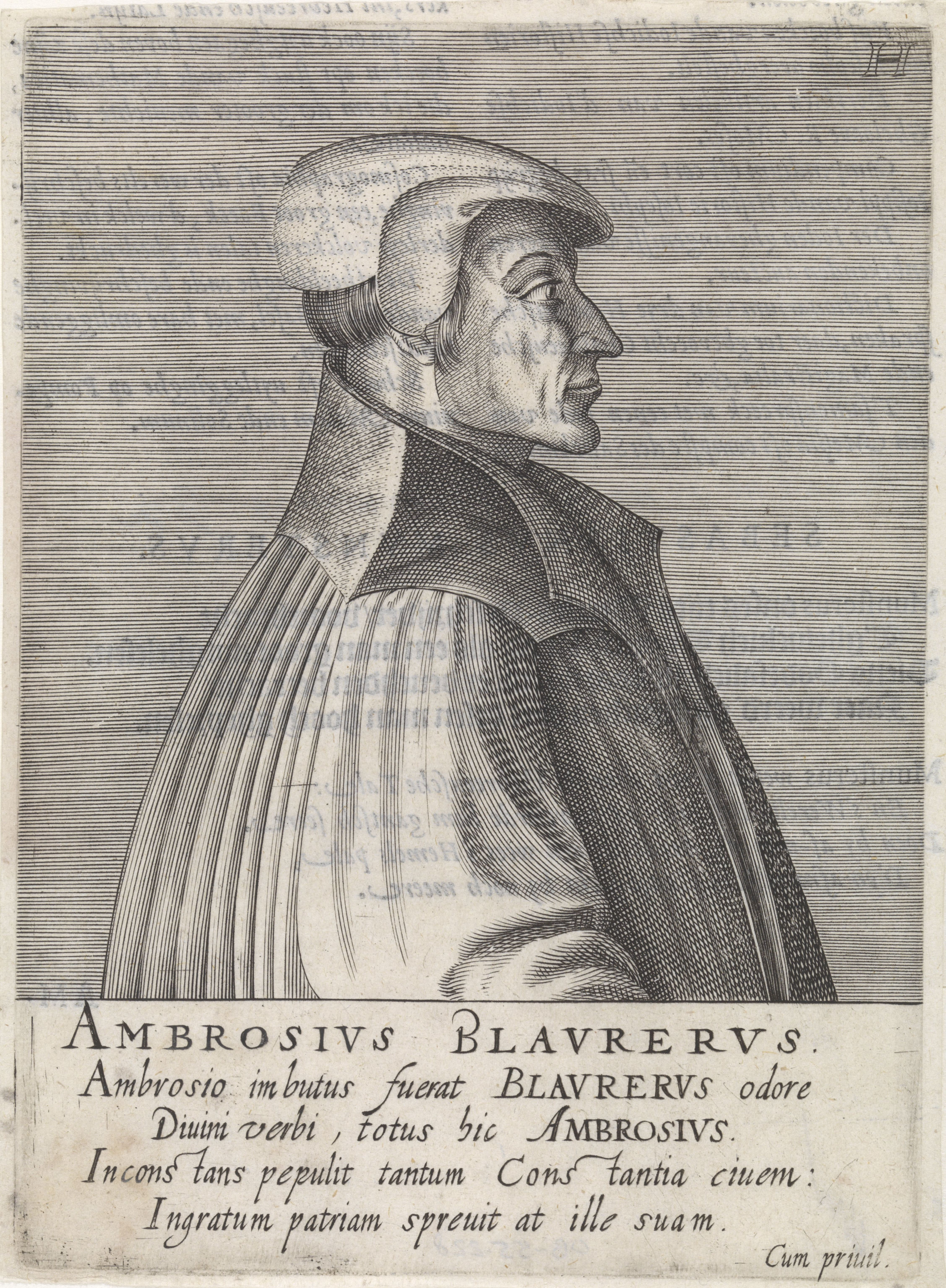 IdentificatieTitel(s): Portret van Ambrosius BlaurerBeroemde hervormers (serietitel)Icones virorum nostra patrumq. memoria illustrium (serietitel)Objecttype: prent boekillustratie Objectnummer: RP-P-OB-55.228Catalogusreferentie: New Hollstein Dutch 162-1(2)Hollstein Dutch 159Opschriften / Merken: verzamelaarsmerk, �erso, gestempeld: Lugt 2228Omschrijving: Buste naar rechts van Ambrosius Blaurer. Onder het portret zijn naam en vier regels in het Latijn. Prent uit (deel 1 van) de serie portretten van beroemde hervormers.VervaardigingVervaardiger: prentmaker: Hendrick Hondius (I) (vermeld op object)verlener van privilege: Staten-Generaal (vermeld op object)Plaats vervaardiging: Den HaagDatering: 1599Fysieke kenmerken: gravure; tekst in boekdruk versoMateriaal: papier Techniek: graveren (drukprocedé) / boekdrukAfmetingen: plaatrand: h 168 mm × b 122 mmToelichtingPrent ook gebruikt als boekillustratie in: Jacob Verheiden, Præstantium aliquot theologorum, qui rom. antichristum præcipuè oppugnarunt, effigies. Den Haag: Hendrick Hondius I en Den Haag: B.C. Nieulandt, 1602-1603. Tevens: Arnhem, J.Janssen, 1604.OnderwerpWie: Ambrosius BlaurerVerwerving en rechtenVerwerving: onbekendCopyright: Publiek domein